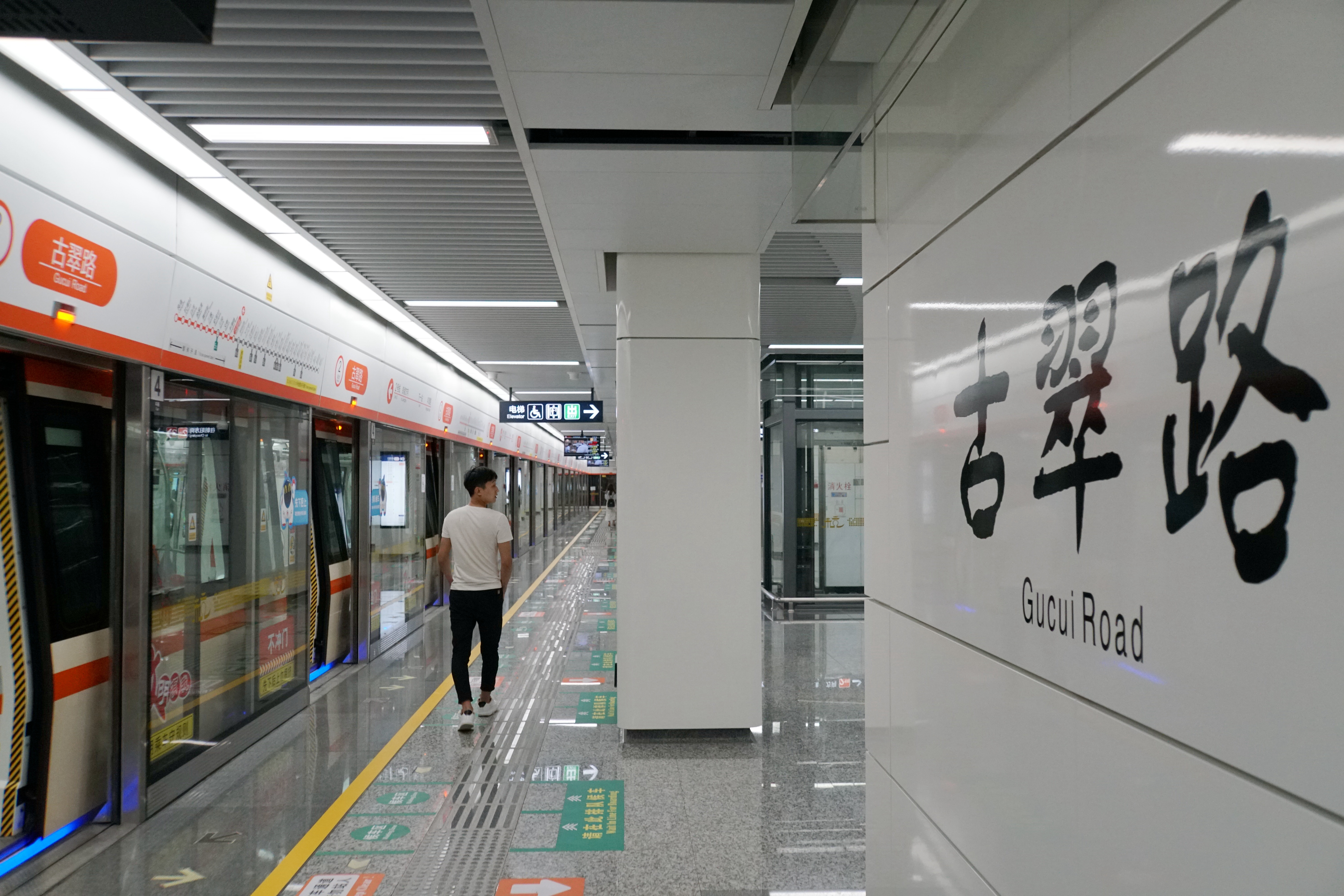 古翠路站大字壁